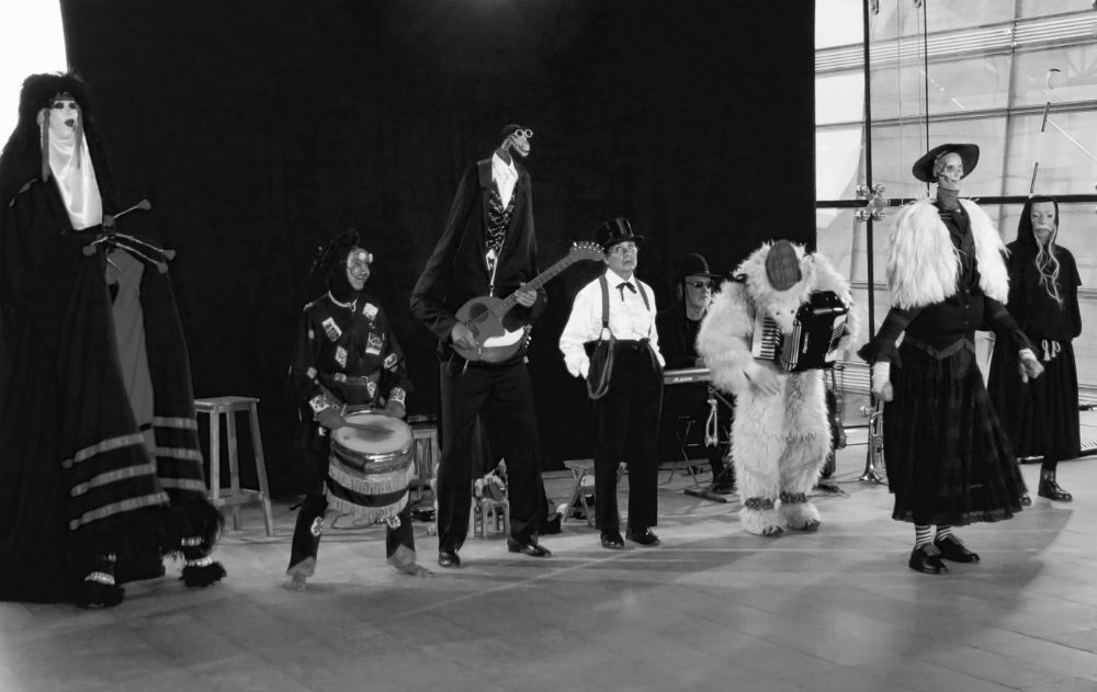 Odin Teatret på Det Kongelige Bibliotek, København